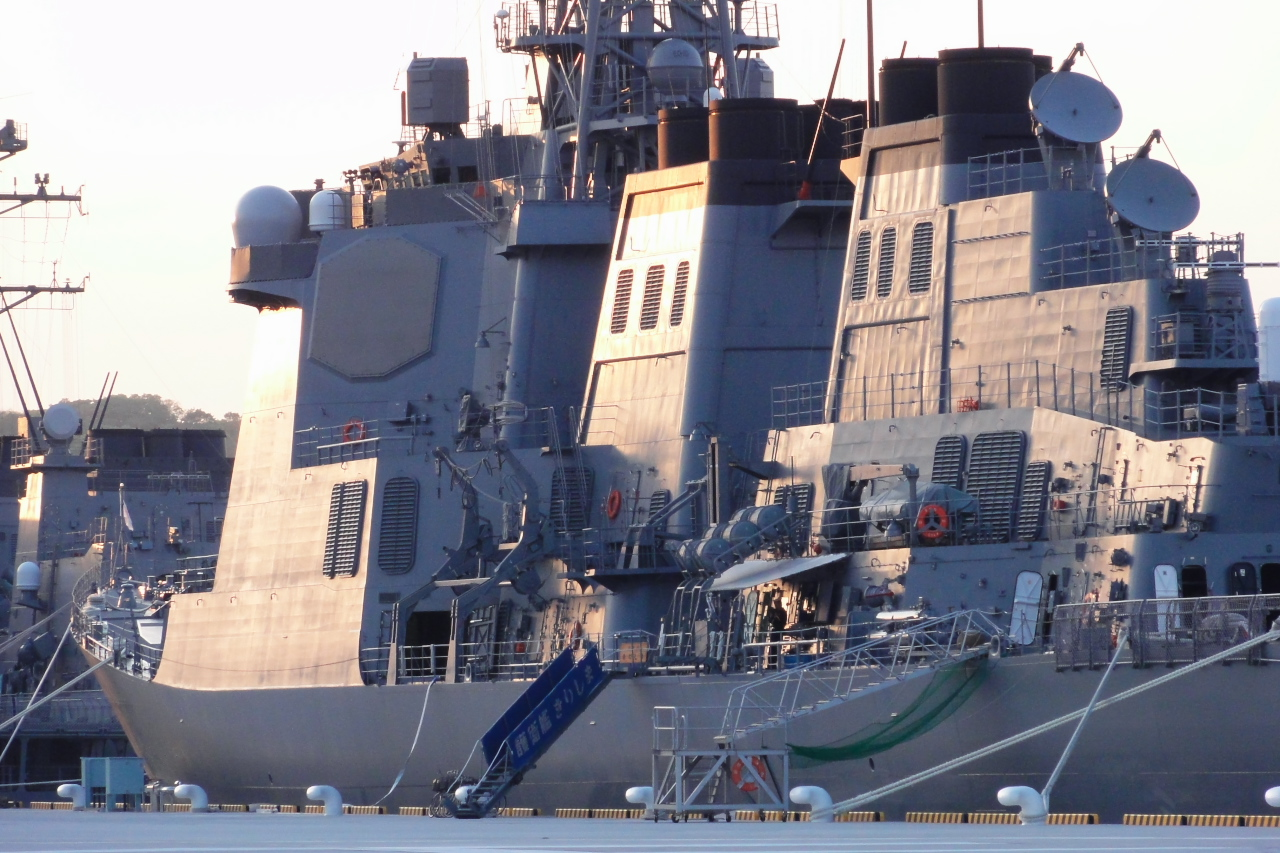 横須賀・逸見岸壁に係留中の護衛艦きりしま。ヴェルニー公園より撮影。